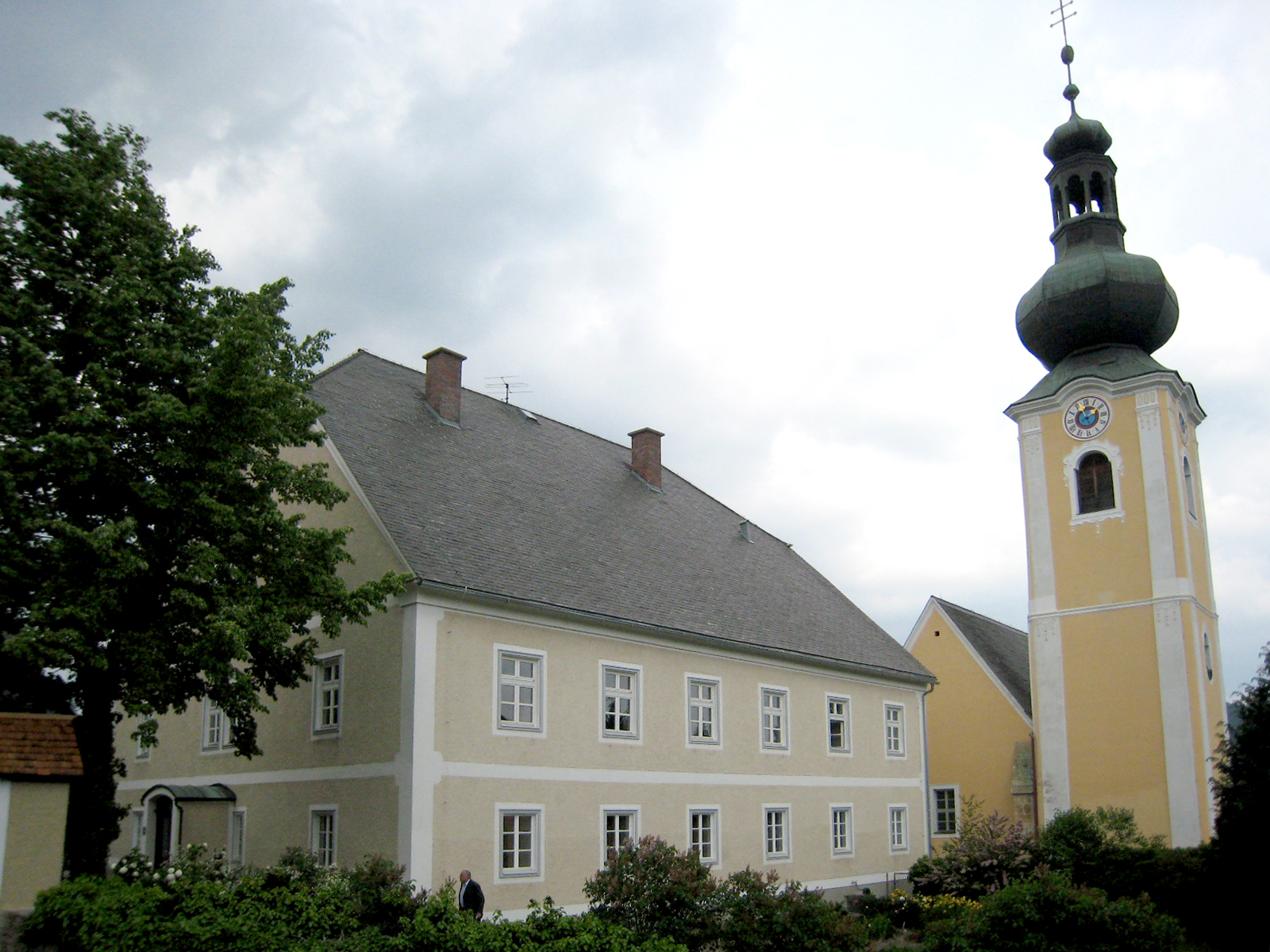 Pfarrhof